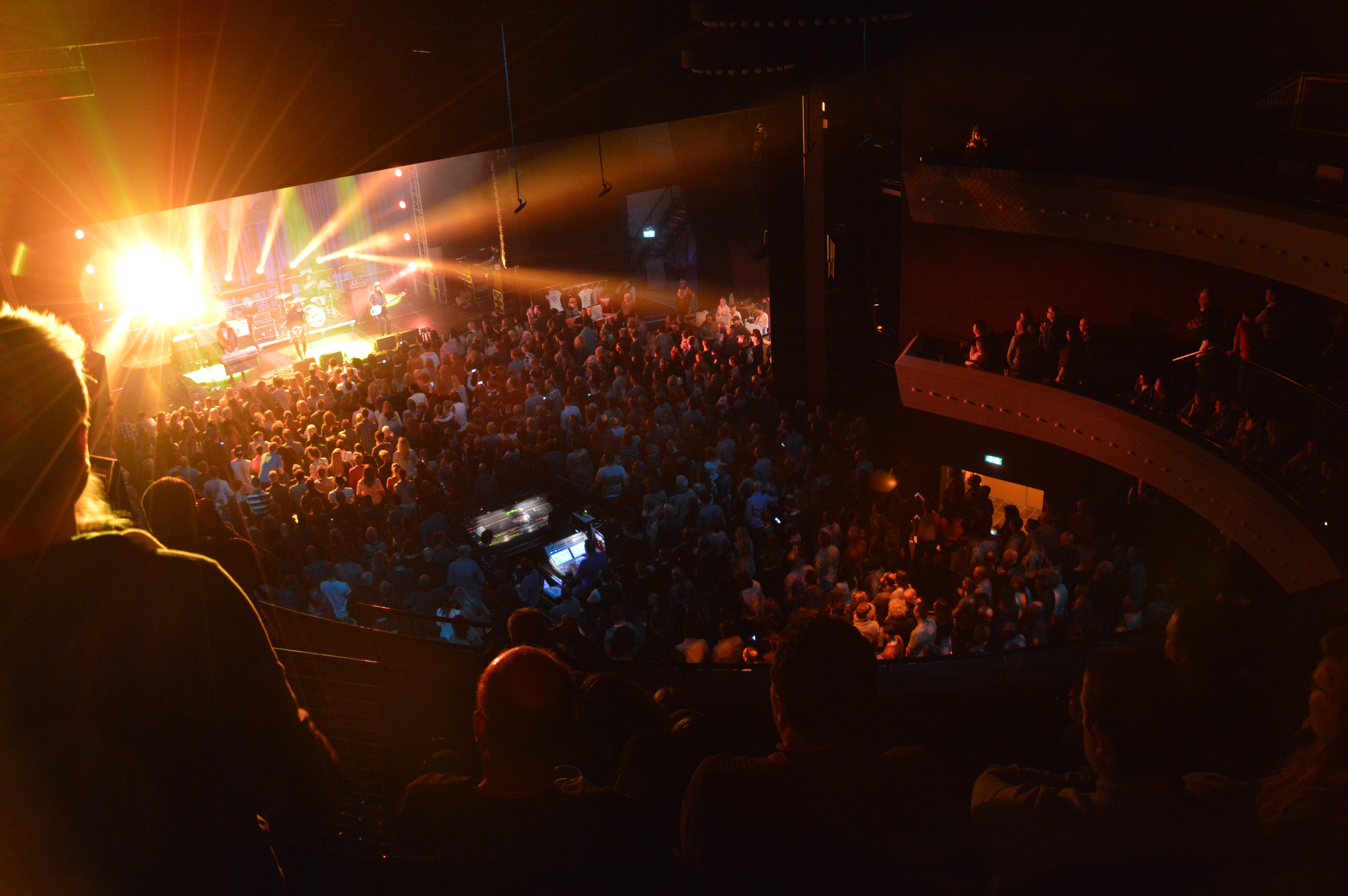 The Deaf op TamboerPop 2015 in Theater De Tamboer te Hoogeveen.